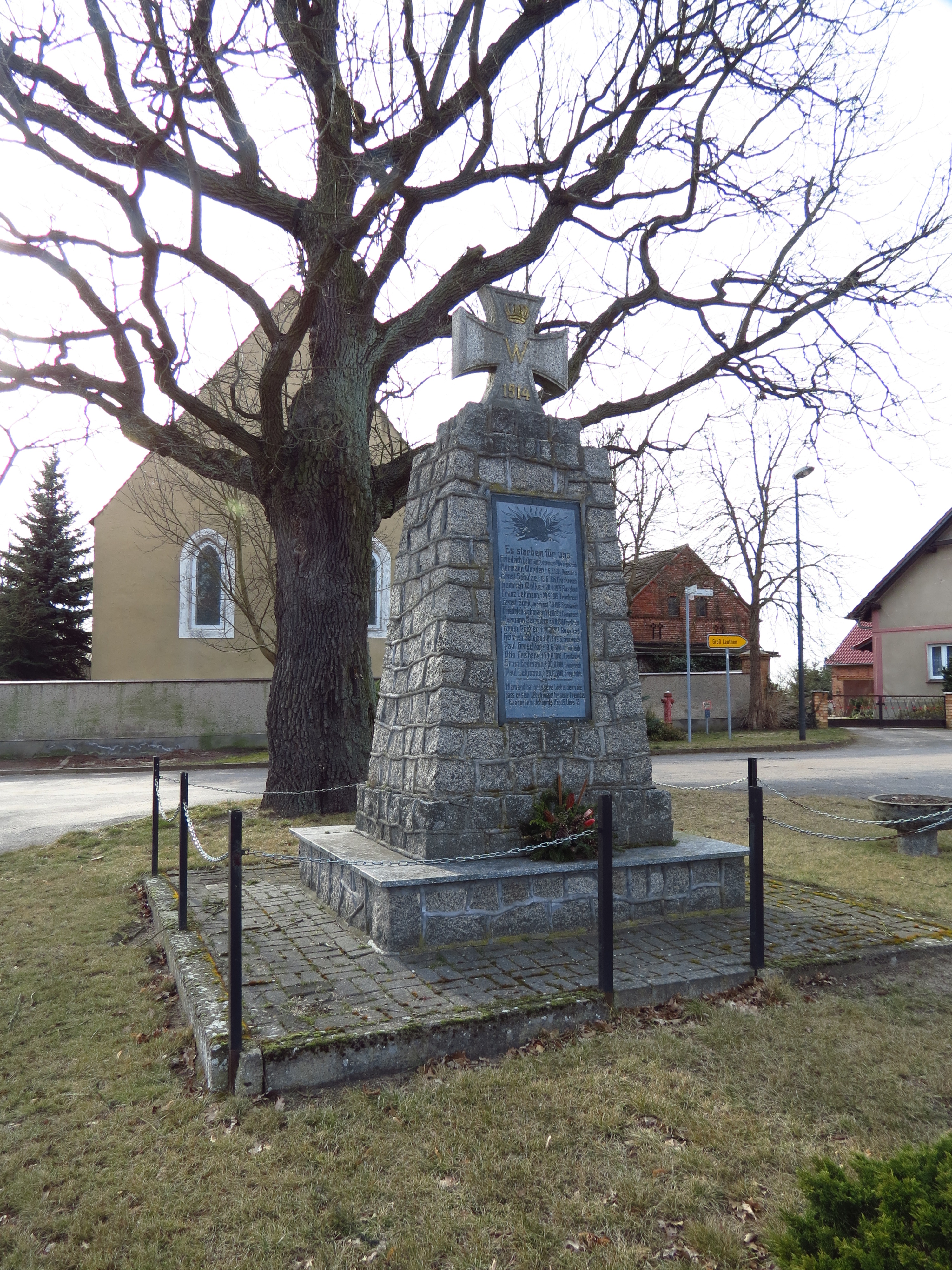 Kriegerdenkmal vor der Ostseite der Dorfkirche, Leibchel, Ortsteil der Gemeinde, Märkische Heide im Landkreis Dahme-Spreewald, Brandenburg, Deutschland